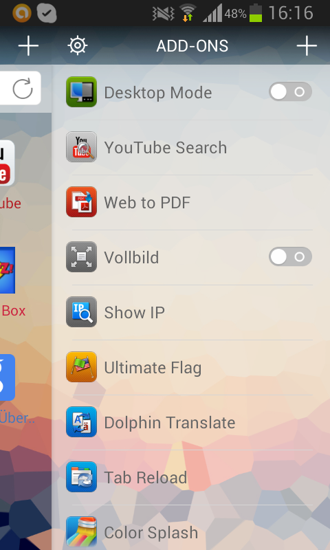 Dolphin Browser-Screenshot mit Design "Art"